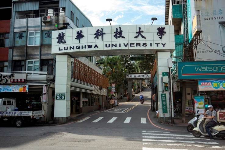 龍華科技大學校門